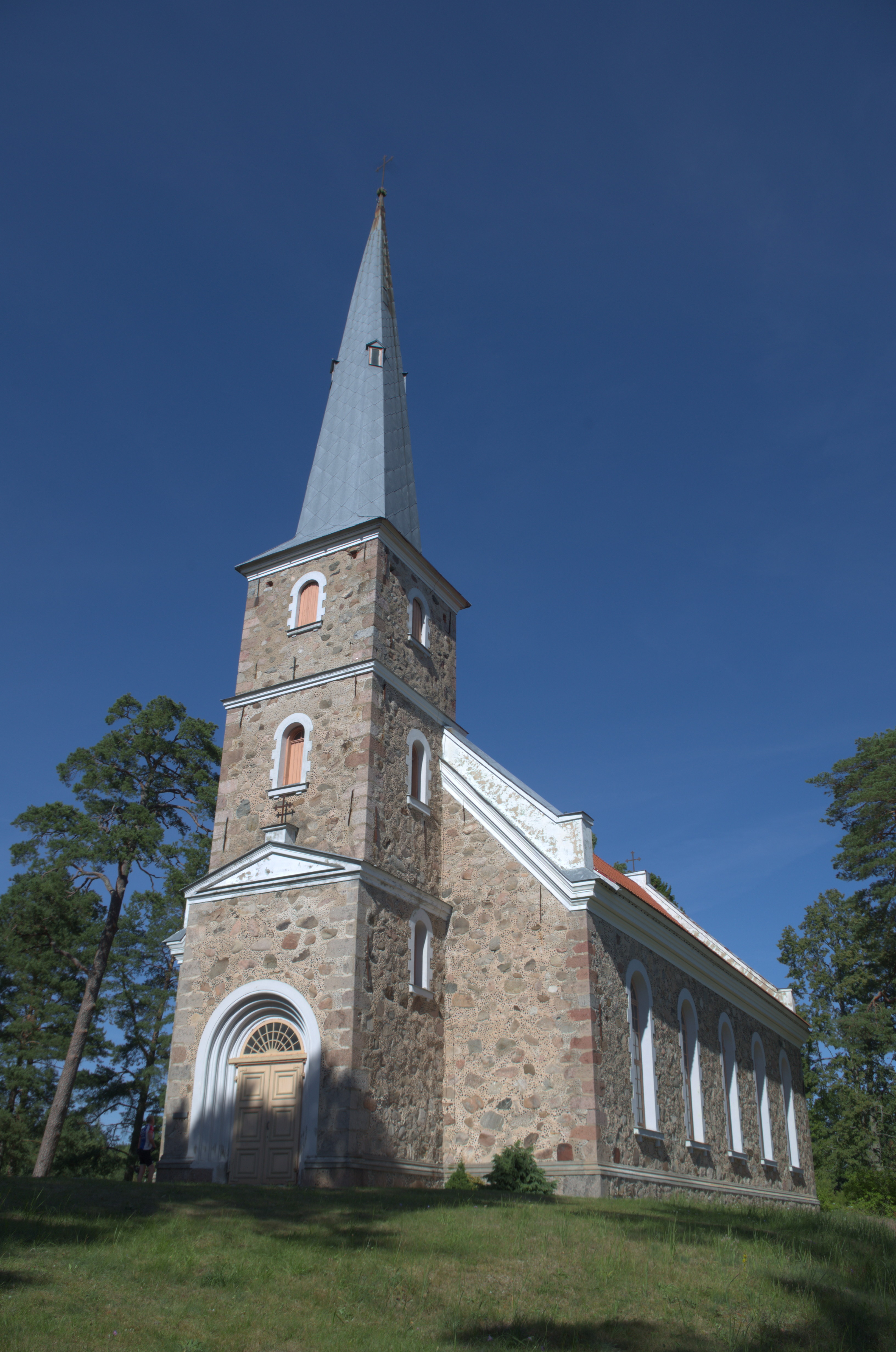 Mazirbe kirik